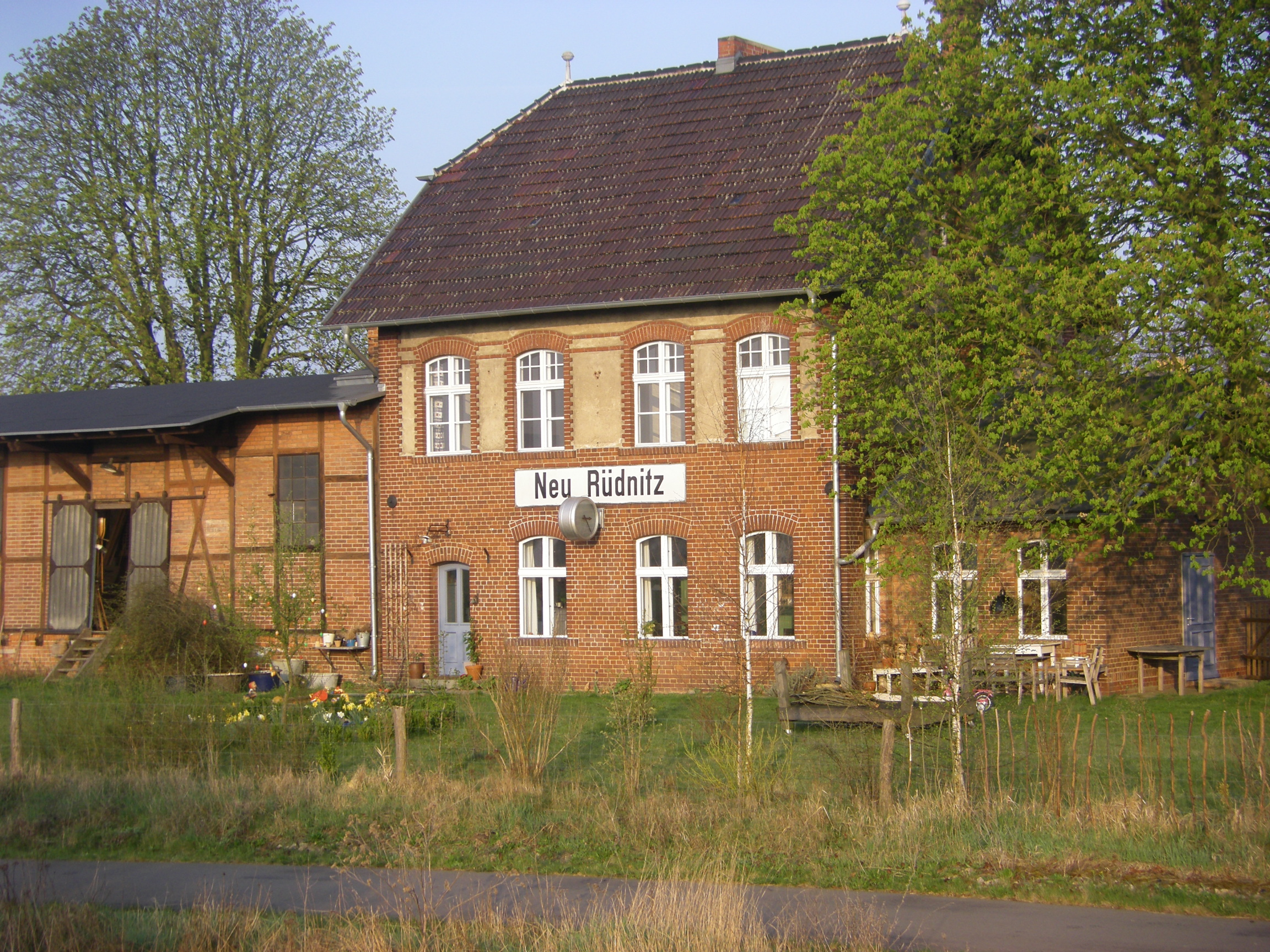 ehemaliges Bahnhofsgebäude Neu Rüdnitz